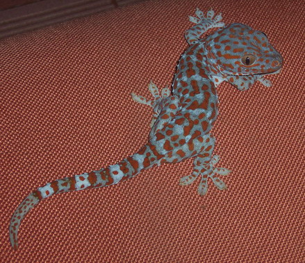 Tokay (Gekko gecko) from Cilimus, Kuningan, Java, Indonesia